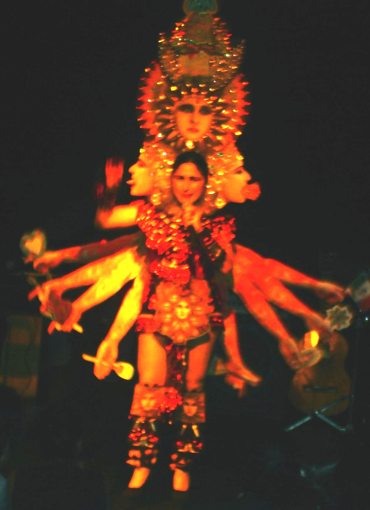 Astrid Hadad en la última presentación de "O-diosas" (2006). Astrid Hadad